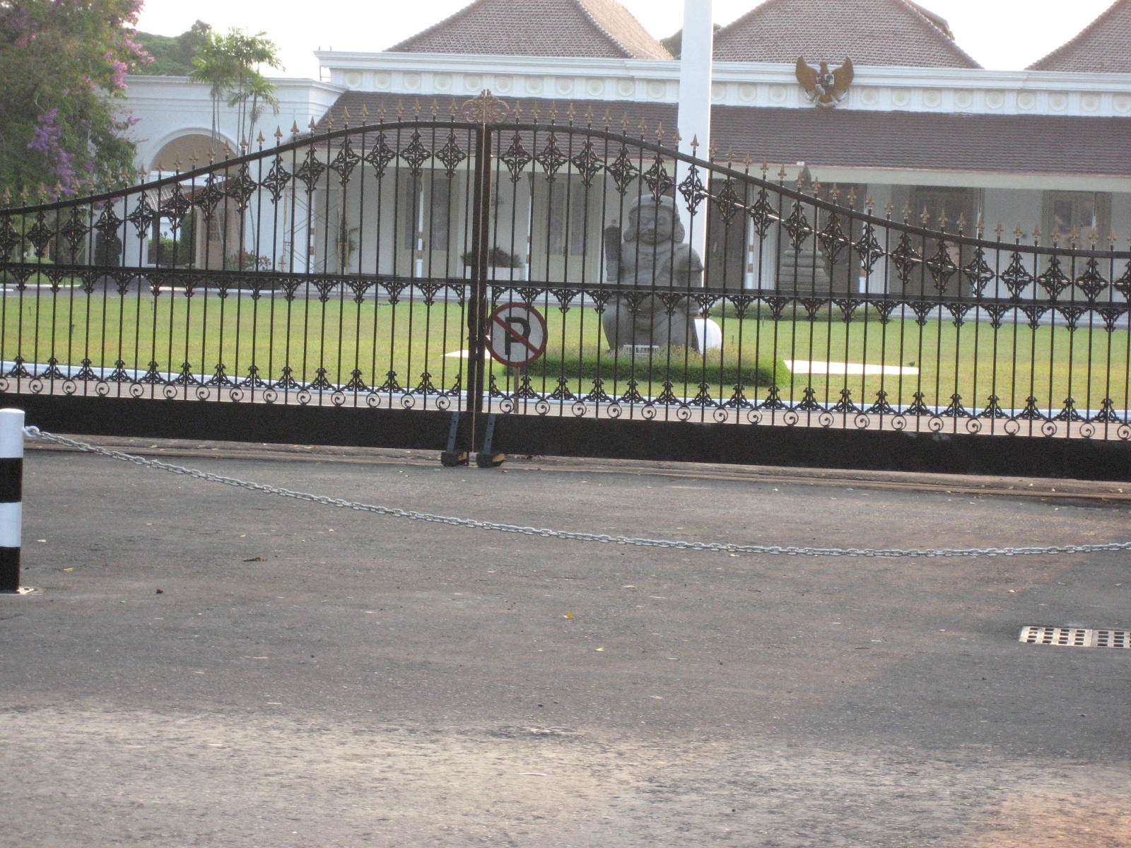 Portail du Gedung Agung à Yogyakarta, un des six palais présidentiels indonésiens